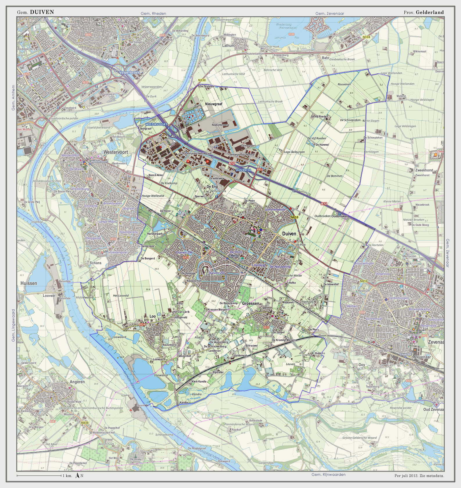 Topografische kaart van gemeente Duiven (2013). Samengesteld door Jan-Willem van Aalst op basis van de GML open geodata van de BRT/Top10NL (basisregistratie Topografie, Kadaster 2011), vrijgegeven door Kadaster onder de Creative Commons BY licentie. Additionele gegevens uit BAG (8 juli 2013), uit de Open Street Map (9 juli 2013) en uit de Risicokaart. Peildatum kaartbeeld: 9 juli 2013. Zie ook Gemeentenatlas.nl Samenstelling en kleurenschema: Jan-Willem van Aalst, met QuantumGIS en Photoshop. Zie ook de Legenda.